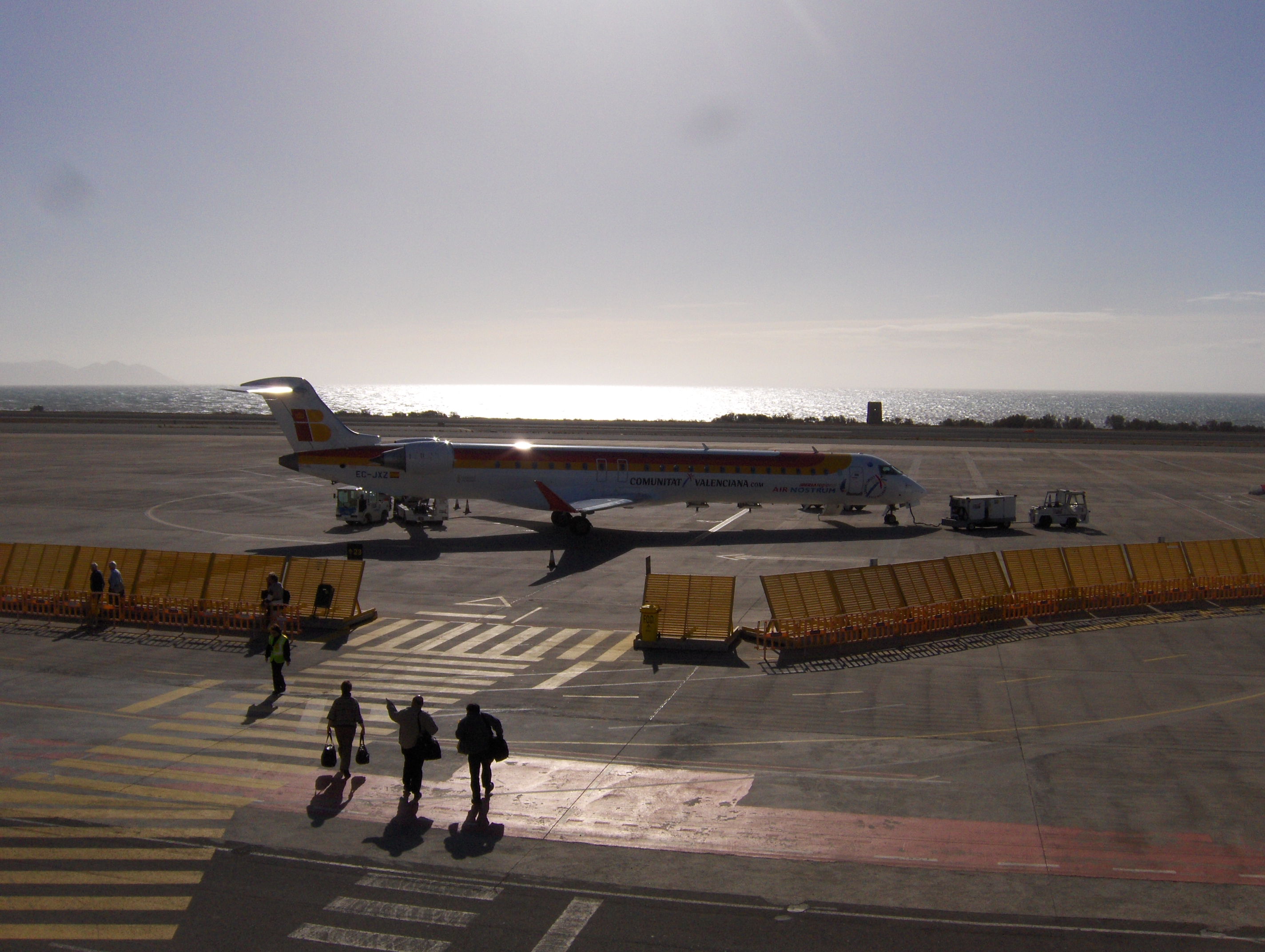 Bombardier CRJ200, en el aeropuerto de Almería